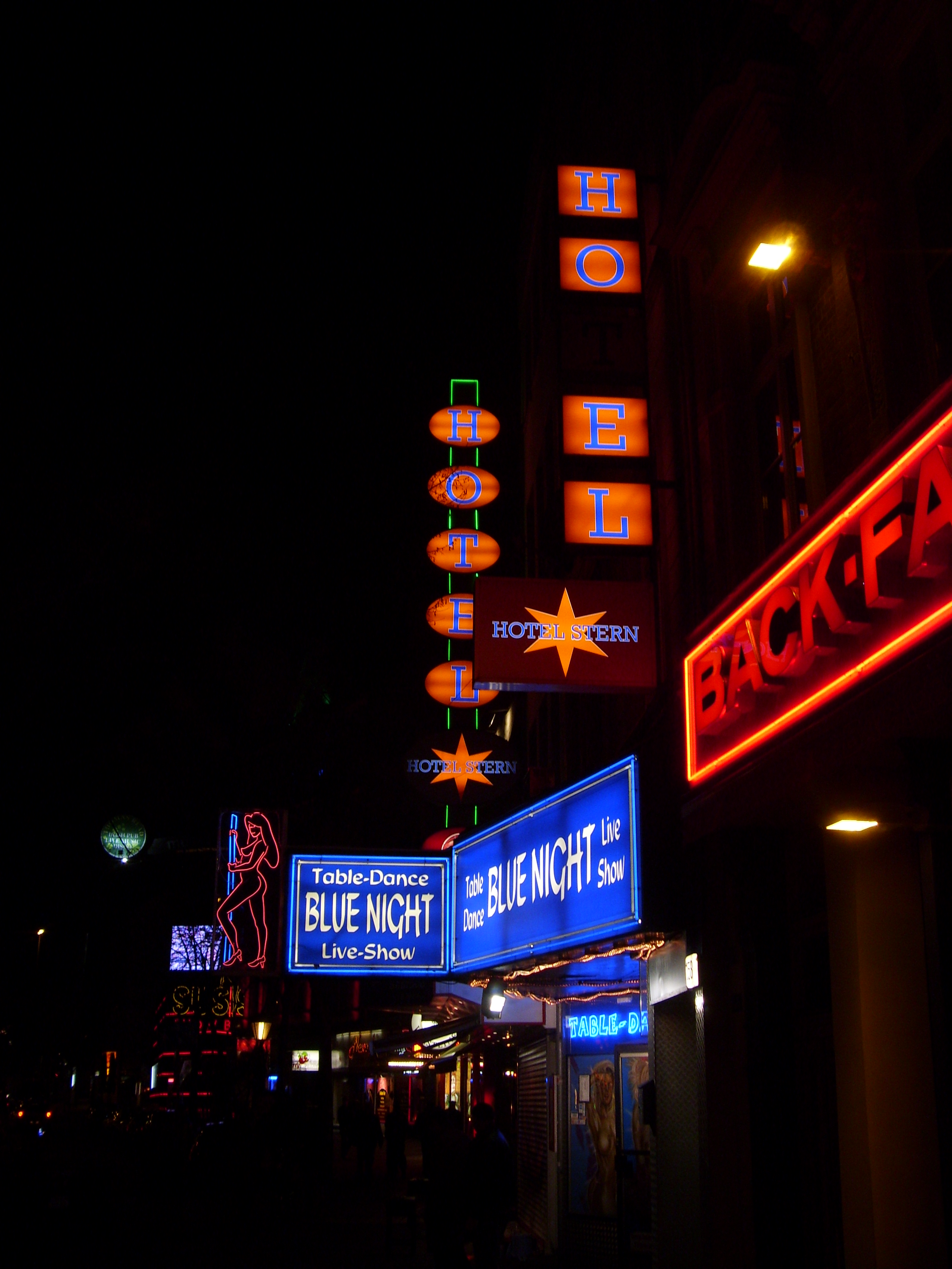 St. Pauli Reeperbahn bei Nacht